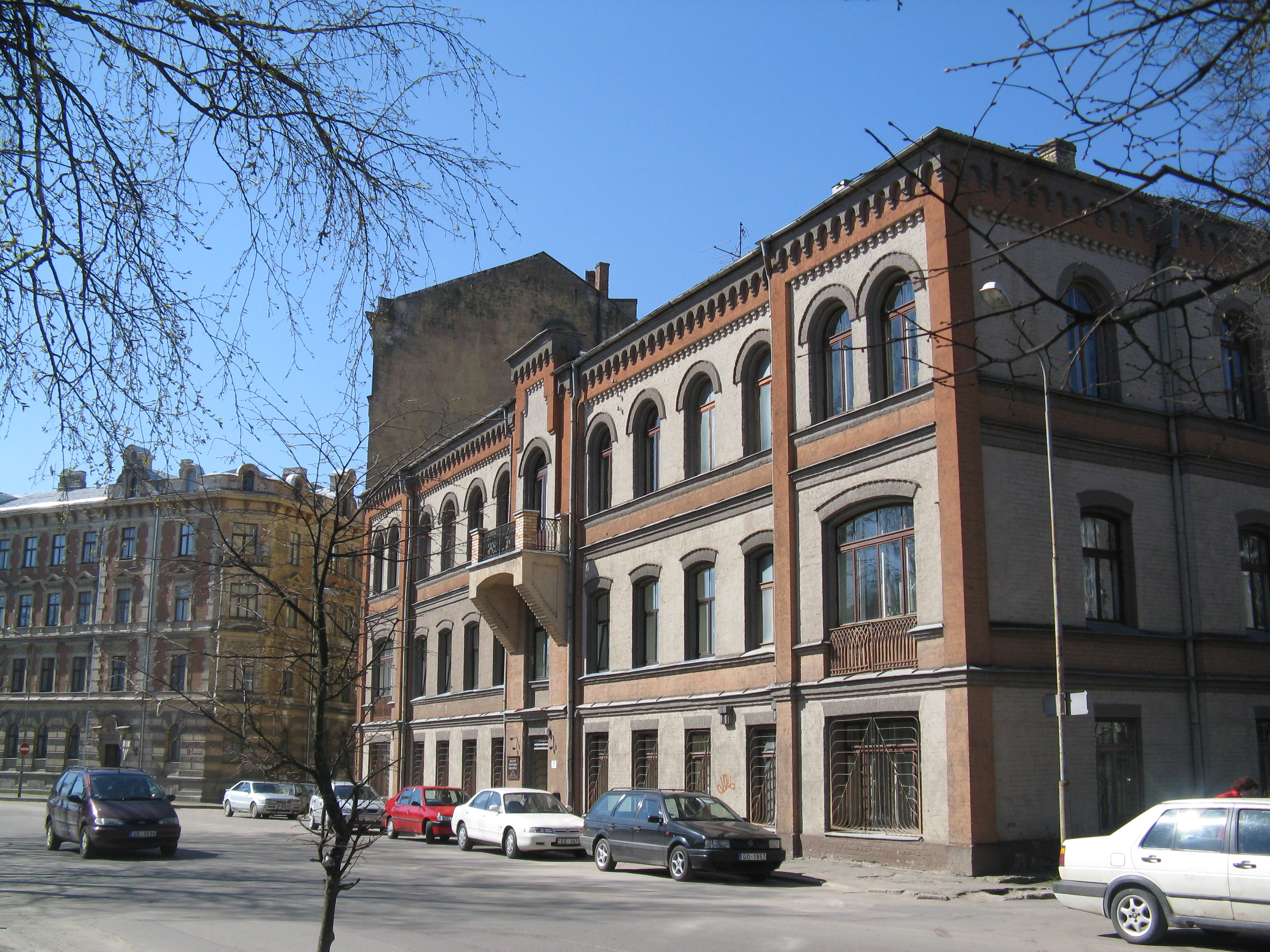 Dzīvojamā ēka, Jelgavas pilsētas bibliotēka